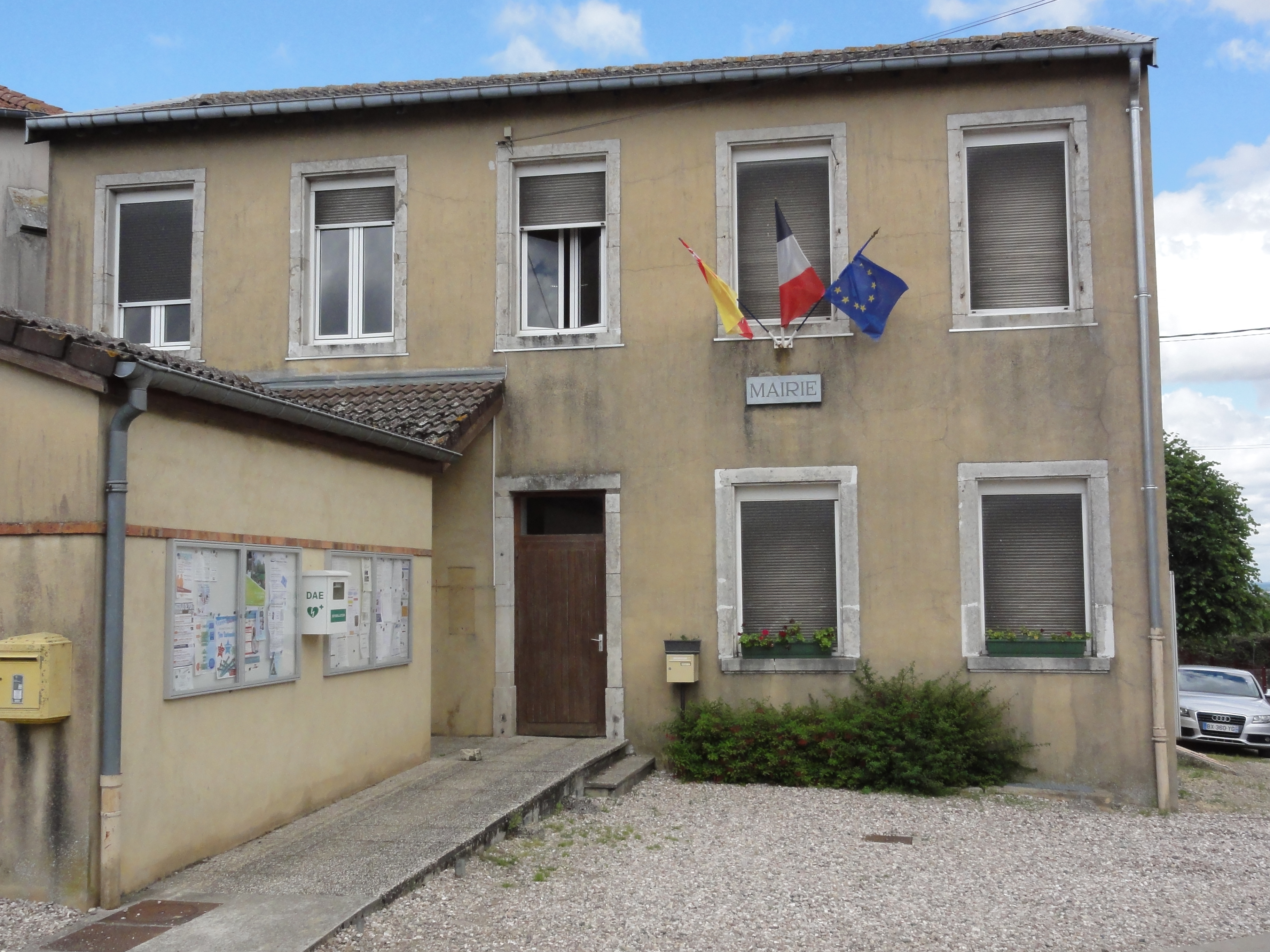 Burthecourt-aux-Chênes (M-et-M) mairie